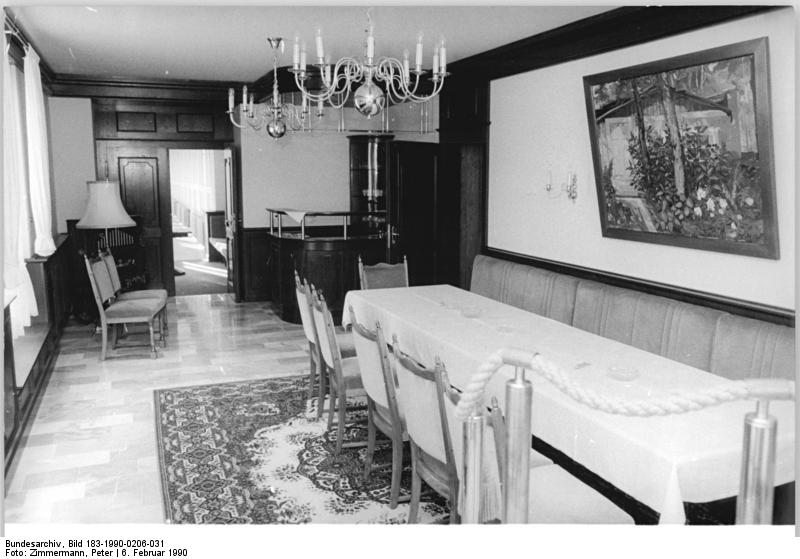 Schönwalde, Erholungsheim des MfS ADN-Zimmermann-6.2.90 Bez. Frankfurt (Oder): Stasiobjekt- in diesen Gefilden des ehemaligen "Stasischlosses" in der Gemeinde Schönwalde (Kreis Bernau) erholten sich in der Vergangenheit vor allem höhere Stasidienstgrade. Das Anwesen wurde inzwischen der Gemeinde übergeben. (siehe auch 30 und 32-35N)